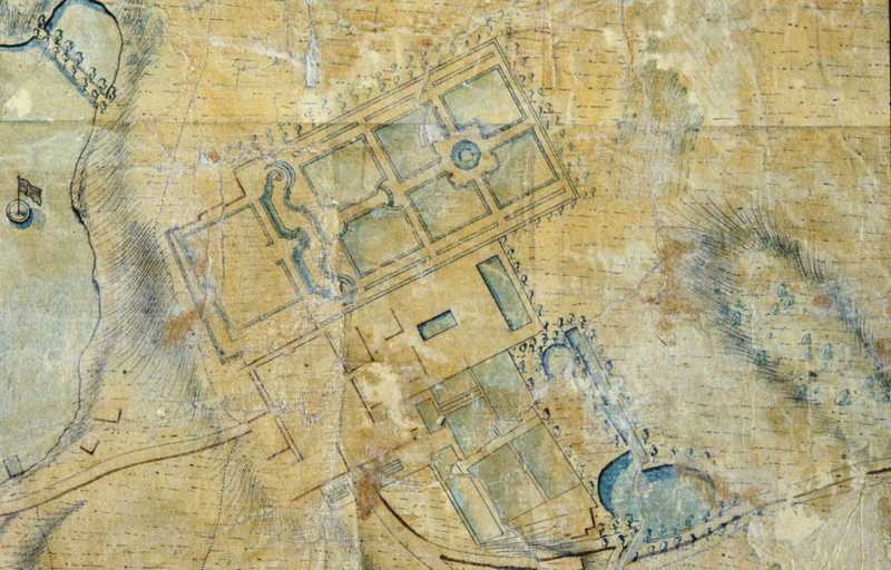 Kart over barokkhagen til Frogner Hovedgård 1777